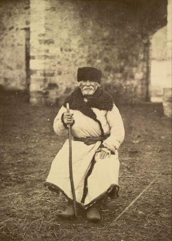 Мужчина в кожухе, Черниговщина, Российская империя